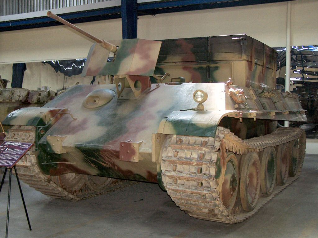 BERGEPANTHER